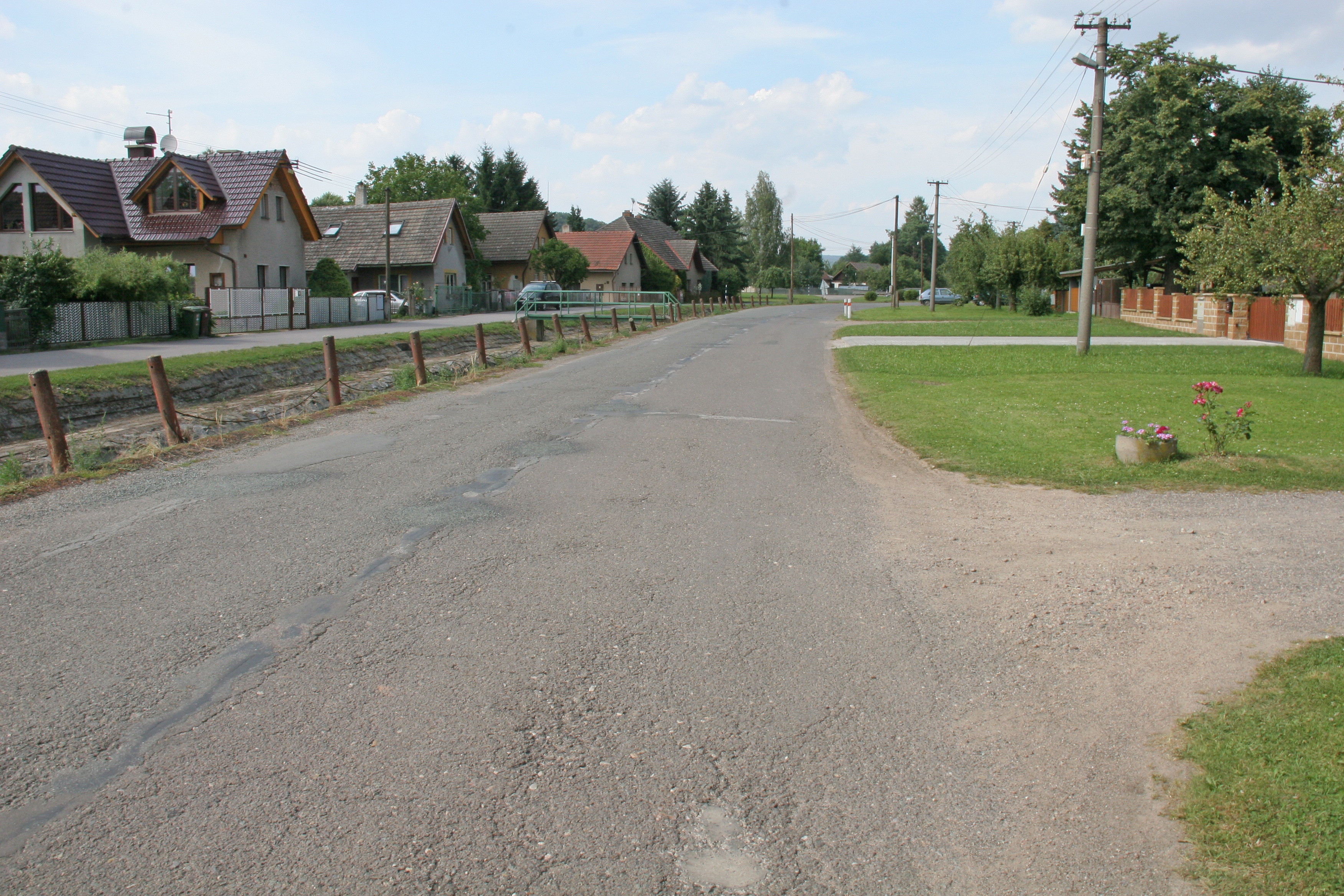 Rožnov čp. 50